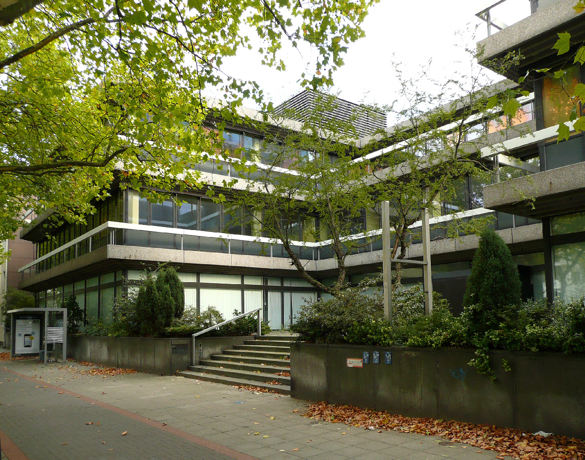 Vorderseite IBM Gebäude Hannover